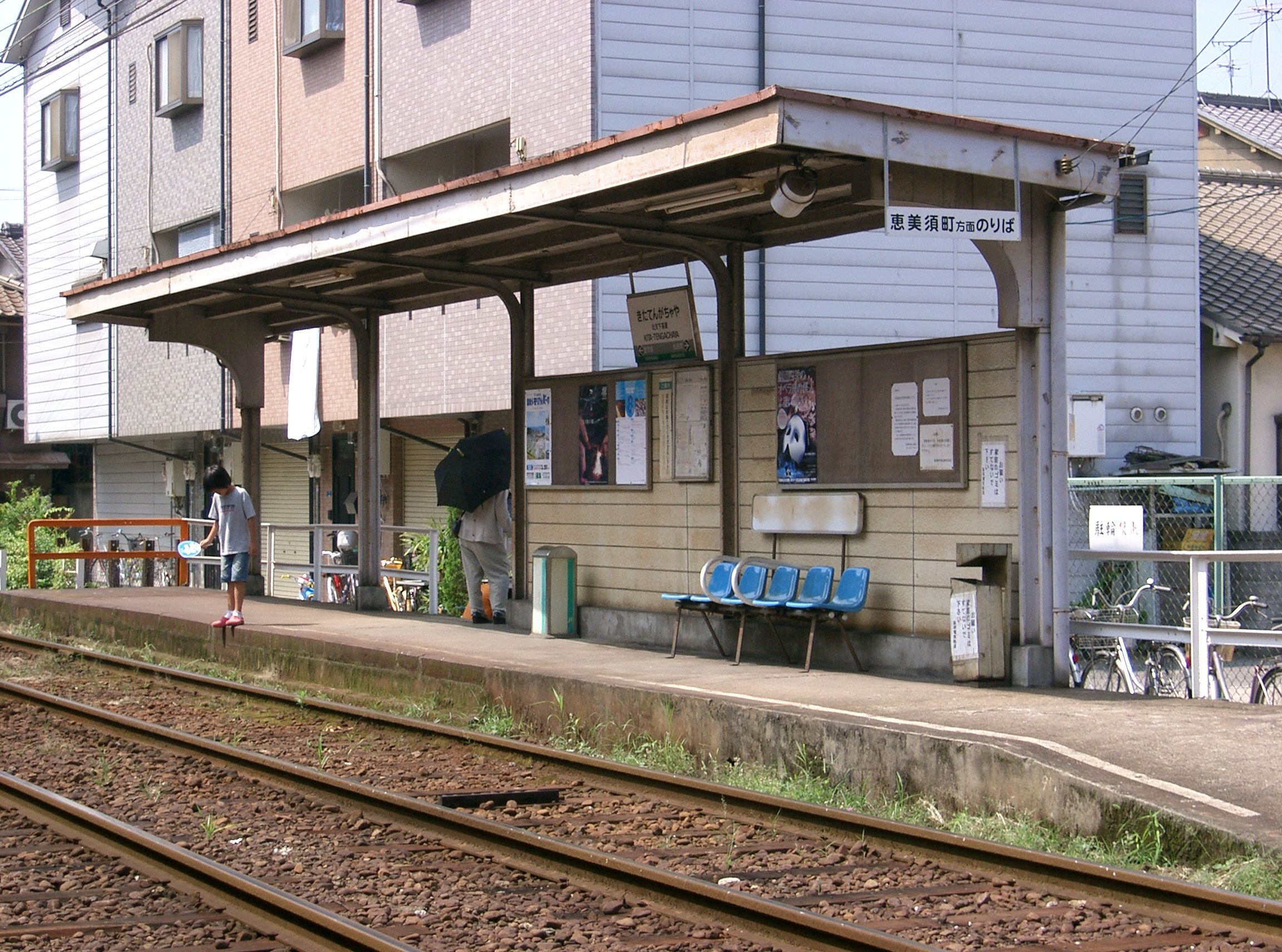 北天下茶屋駅